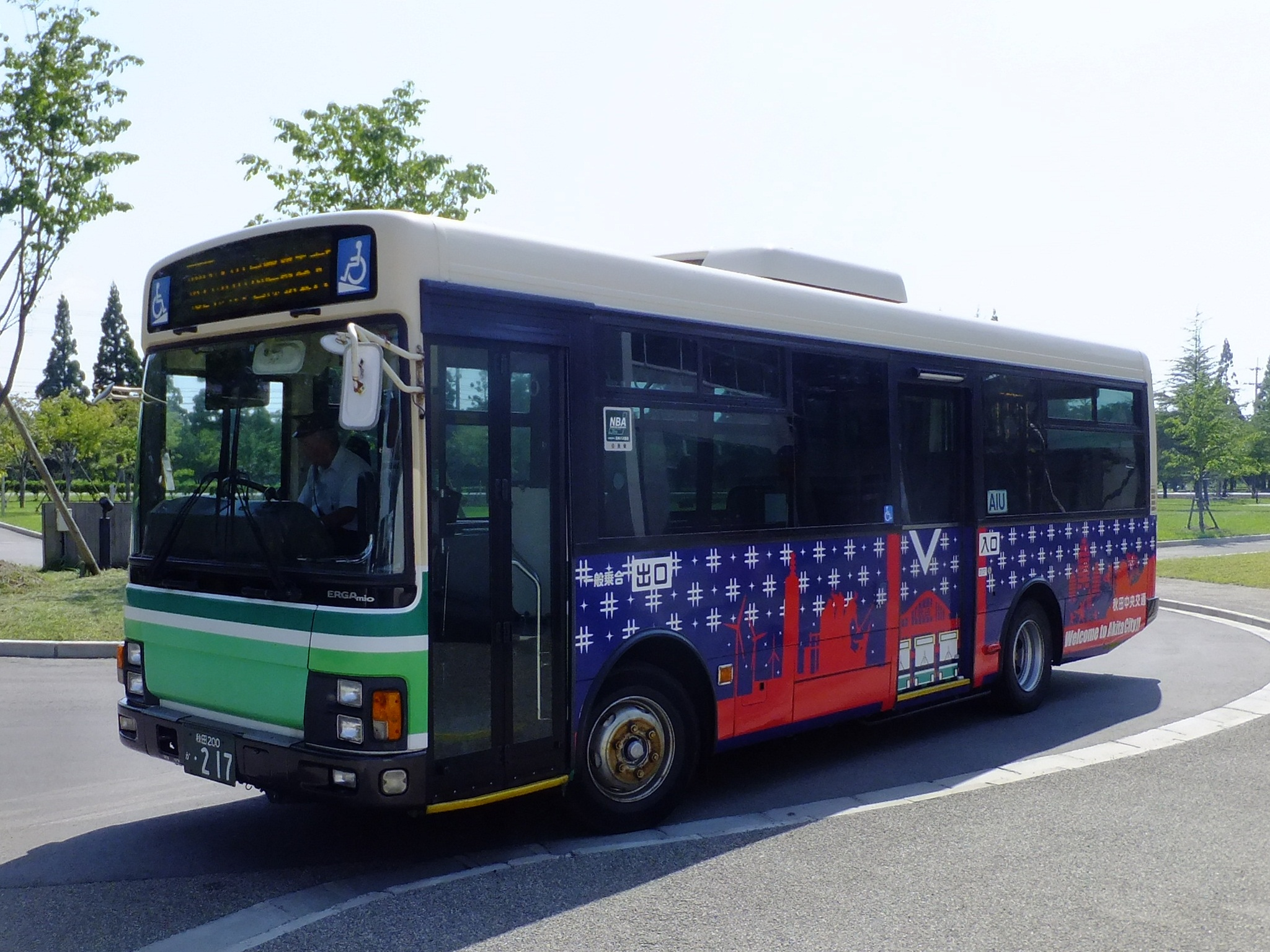 秋田中央交通、国際教養大学御所野線バス。イオンモール秋田から150円で国際教養大学まで行く事ができる。国際教養大学前ロータリーにて。